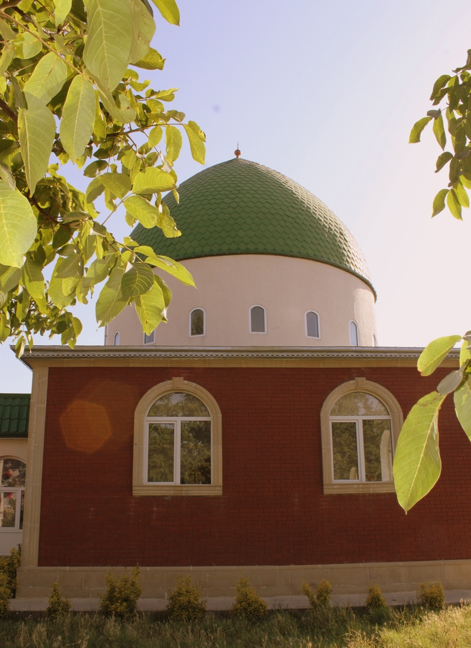 Мечеть в Шемахинском районе, Азербайджана.